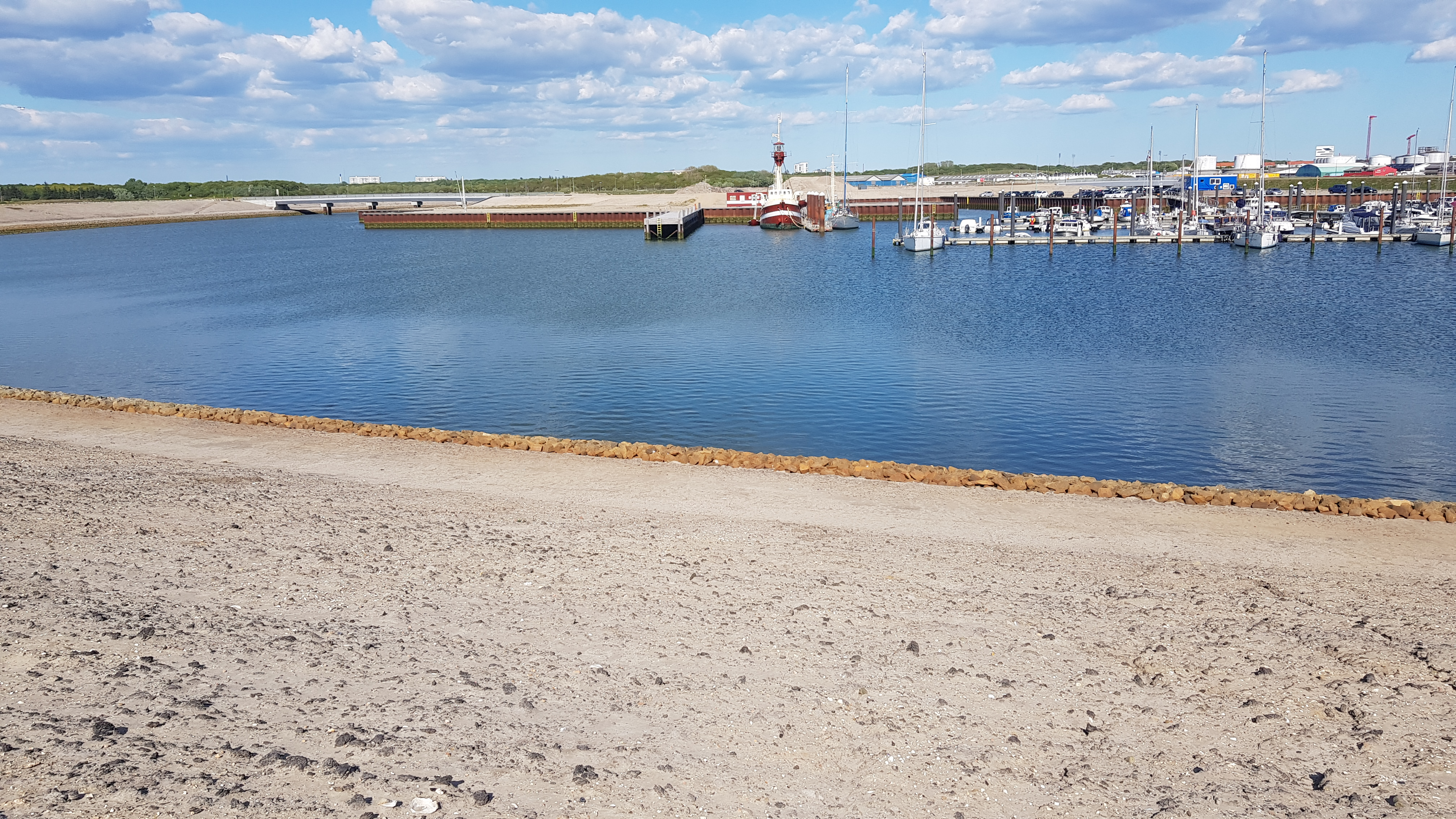 Havneøen i Esbjerg